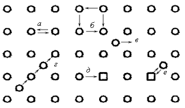 виды механизмов диффузии в полупроводнике